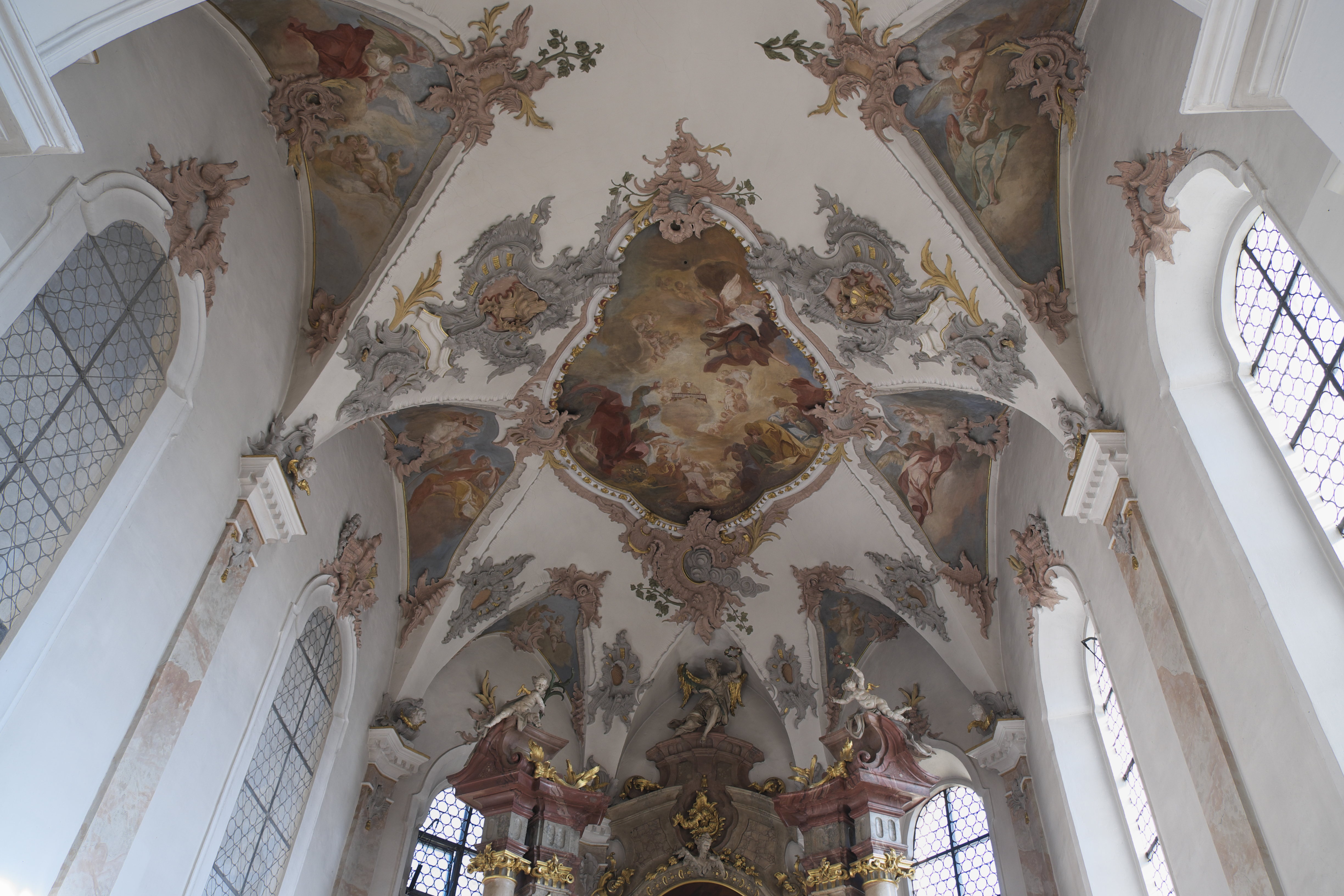 Katholische Pfarrkirche St. Martin in Altheim (bei Riedlingen) im Landkreis Biberach (Baden-Württemberg/Deutschland), Deckenmalerei im Chor